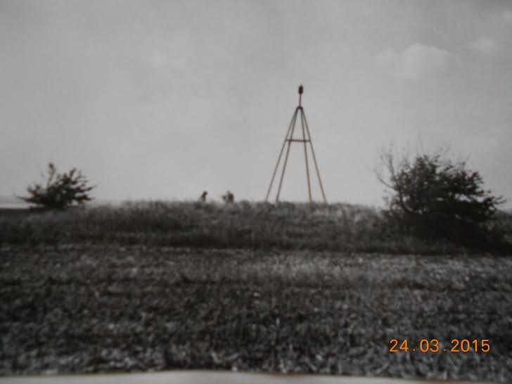 Робочі світлин ЗПДЕ "Жовтнева" 1980 рік. с.Петро-Михайлівка надані для публікацій учасником і фотокором археологічної експедиції Валерієм Чорним